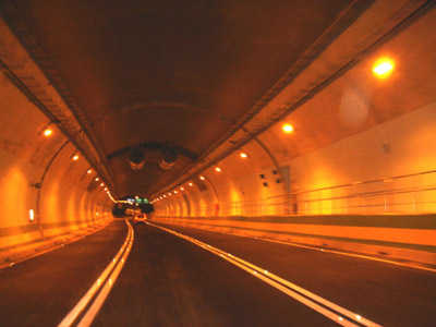 信義快速道路象山隧道內景，信義快速道路是台北市境內最新開闢的一條快速道路，貫穿台北盆地東南區的山區，短短3.2公里的全長中，就有2.4公里是隧道。圖中所見是較北邊的象山隧道中一景。本圖片是由上傳者SElephant本人於2005年5月拍攝。